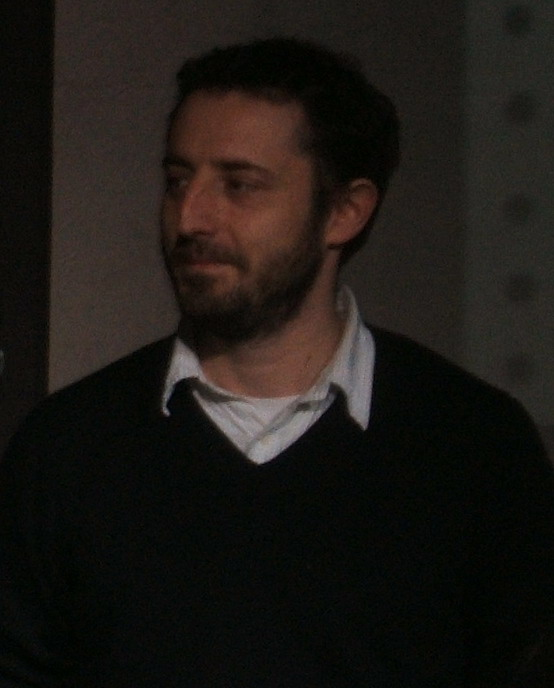 Никола Ђуричко као водитељ на фестивалу филмова сниманих мобилним телефонима у београдском Дому Омладине, 2011. године.